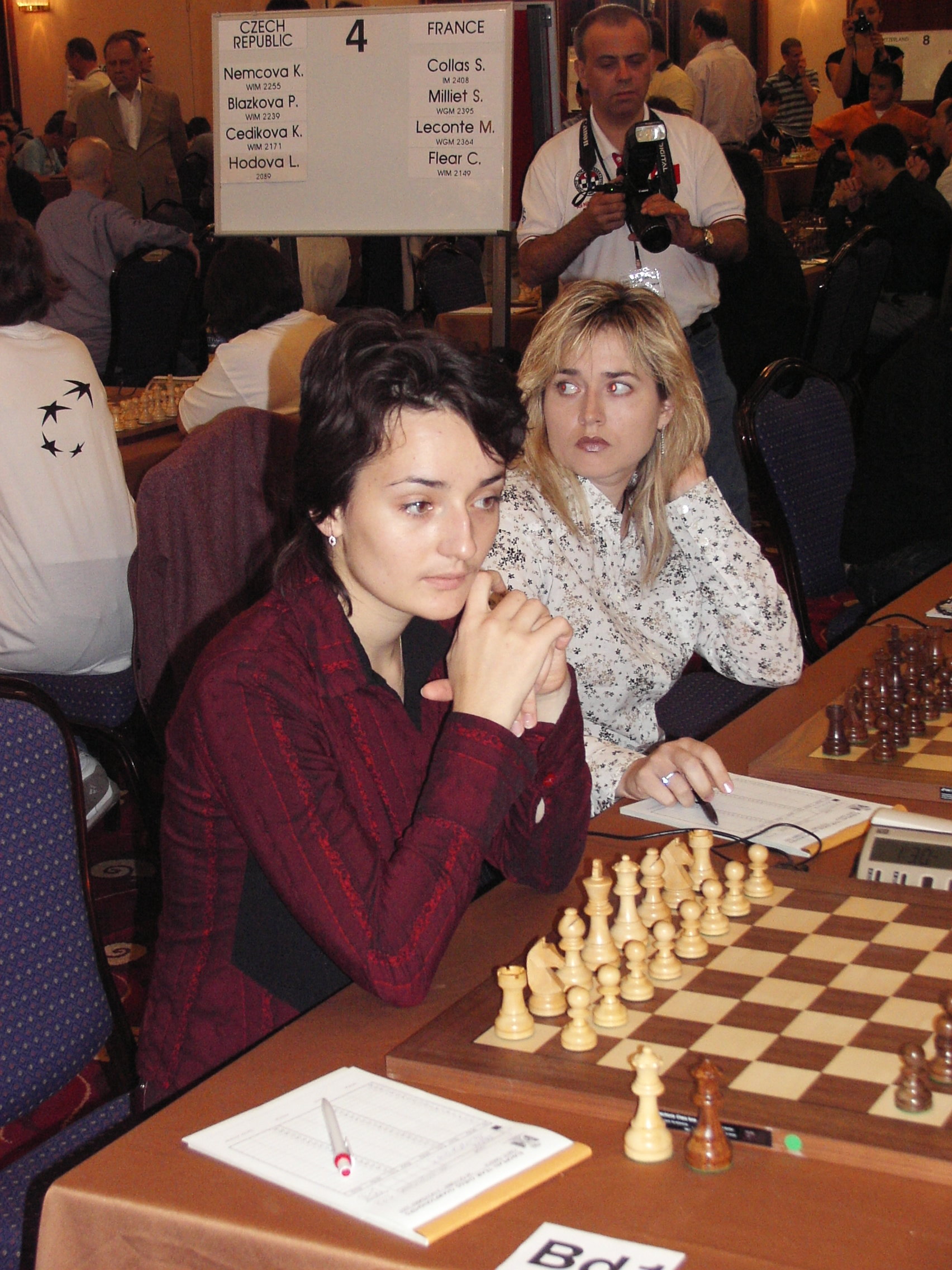 Katerina Lahno Ukraine and Natalia Zhukova ((UKR)), EuroChess Iraklion 2007